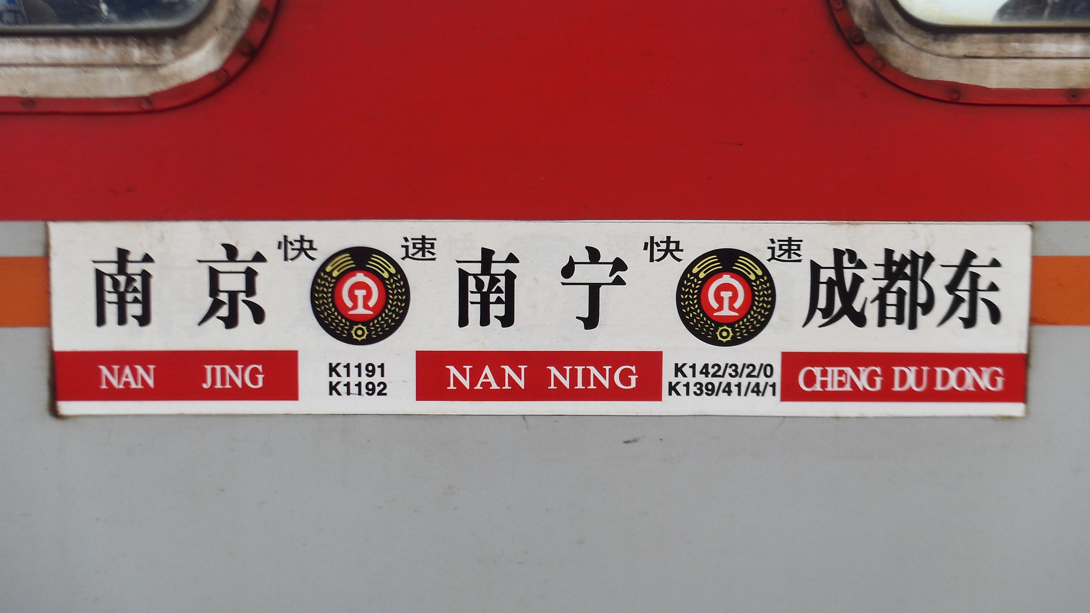 往返南京-南宁的K1191/2次列车水牌，与往返南宁-成都东的K139/40/41/42/43/44次列车套跑